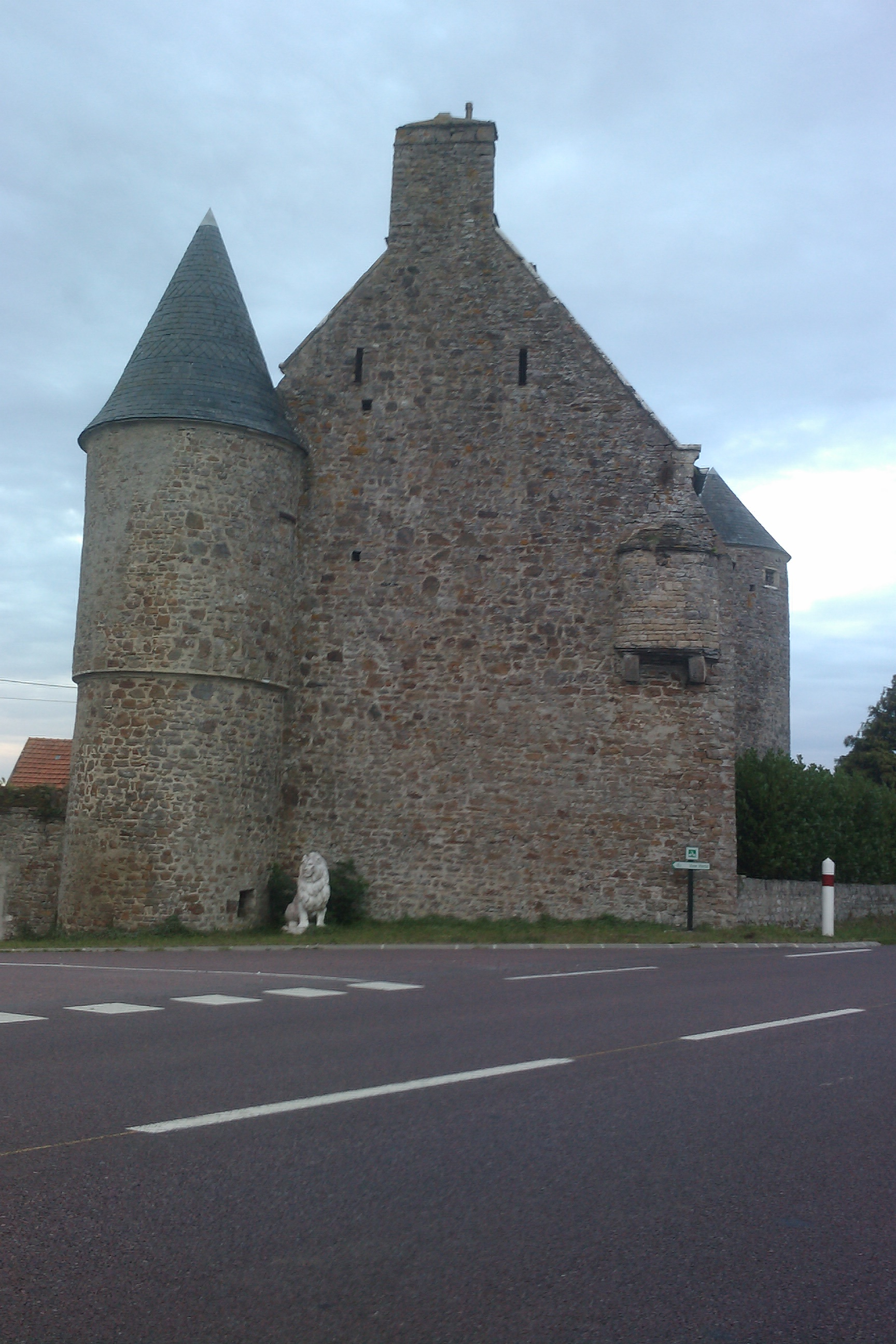 Manoir de la Motte situé sur la D900 entre Lessay et La Haye-du-Puits